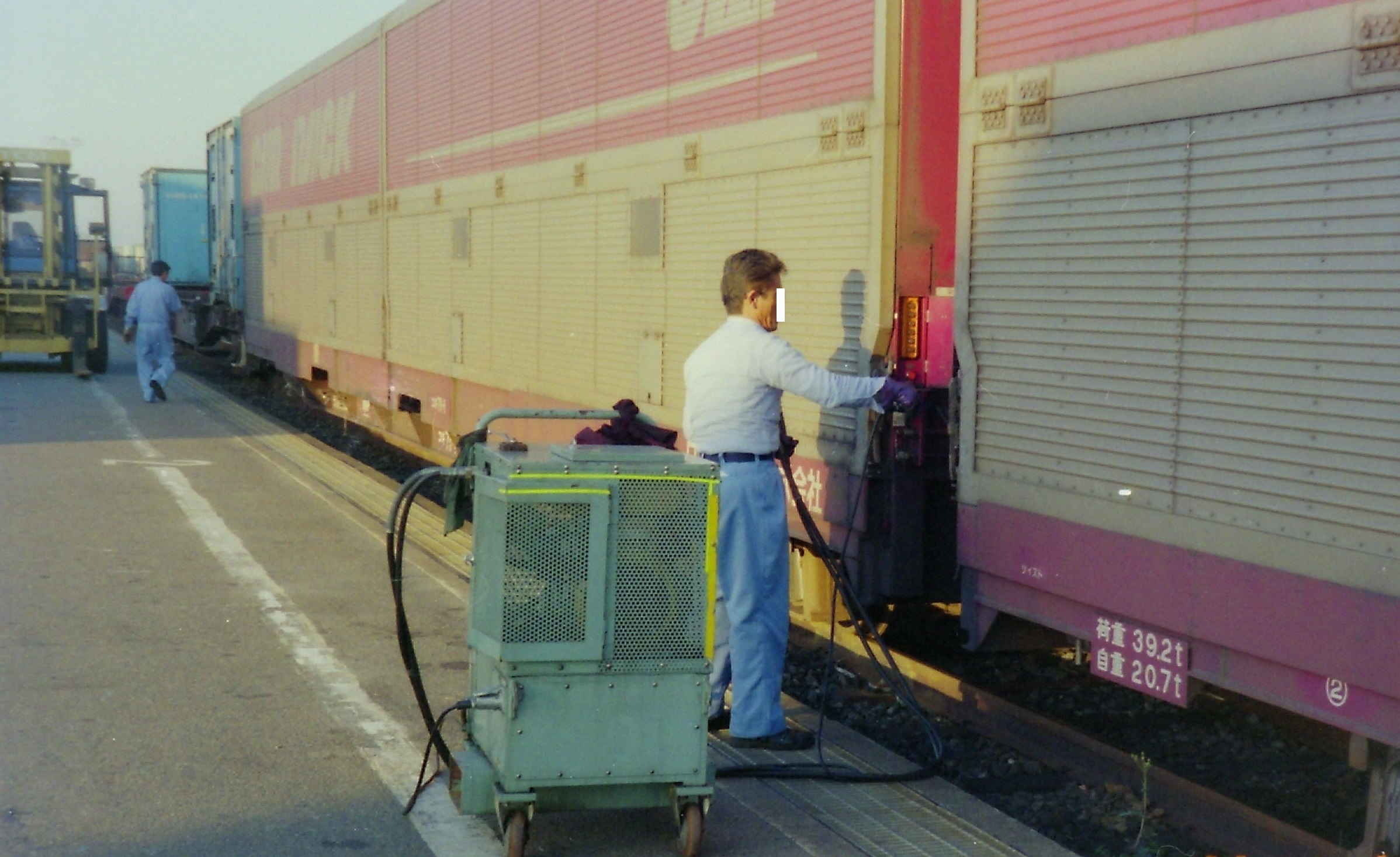 名古屋貨物ターミナル駅構内で今は無きカートレインへ、カーラックコンテナを積載している作業風景。 作業員が操作している緑色の箱型機械は、カートレインのウイング式外壁を作動させる為の専用油圧ポンプ装置。